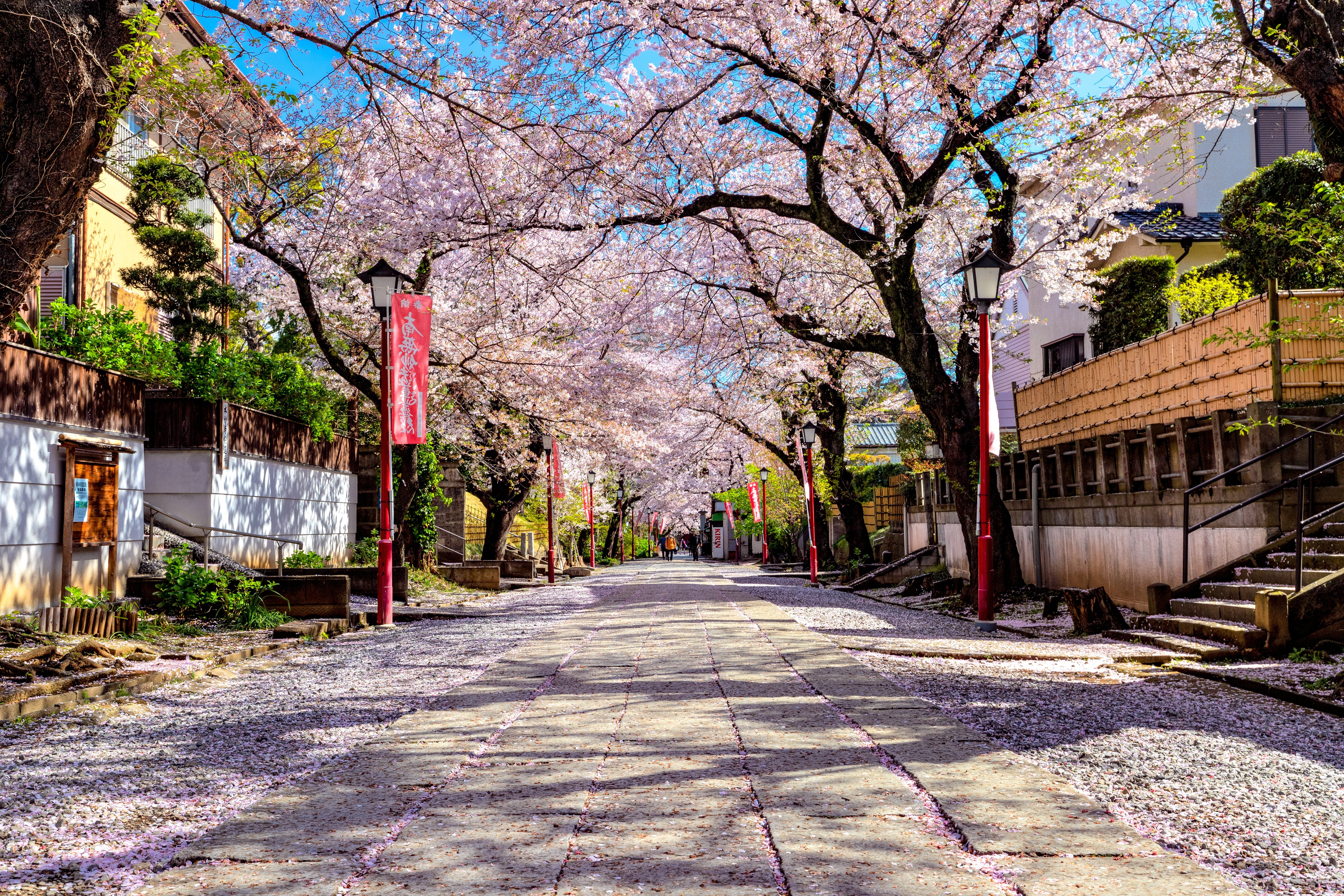 千葉県市川市、中山法華経寺、桜